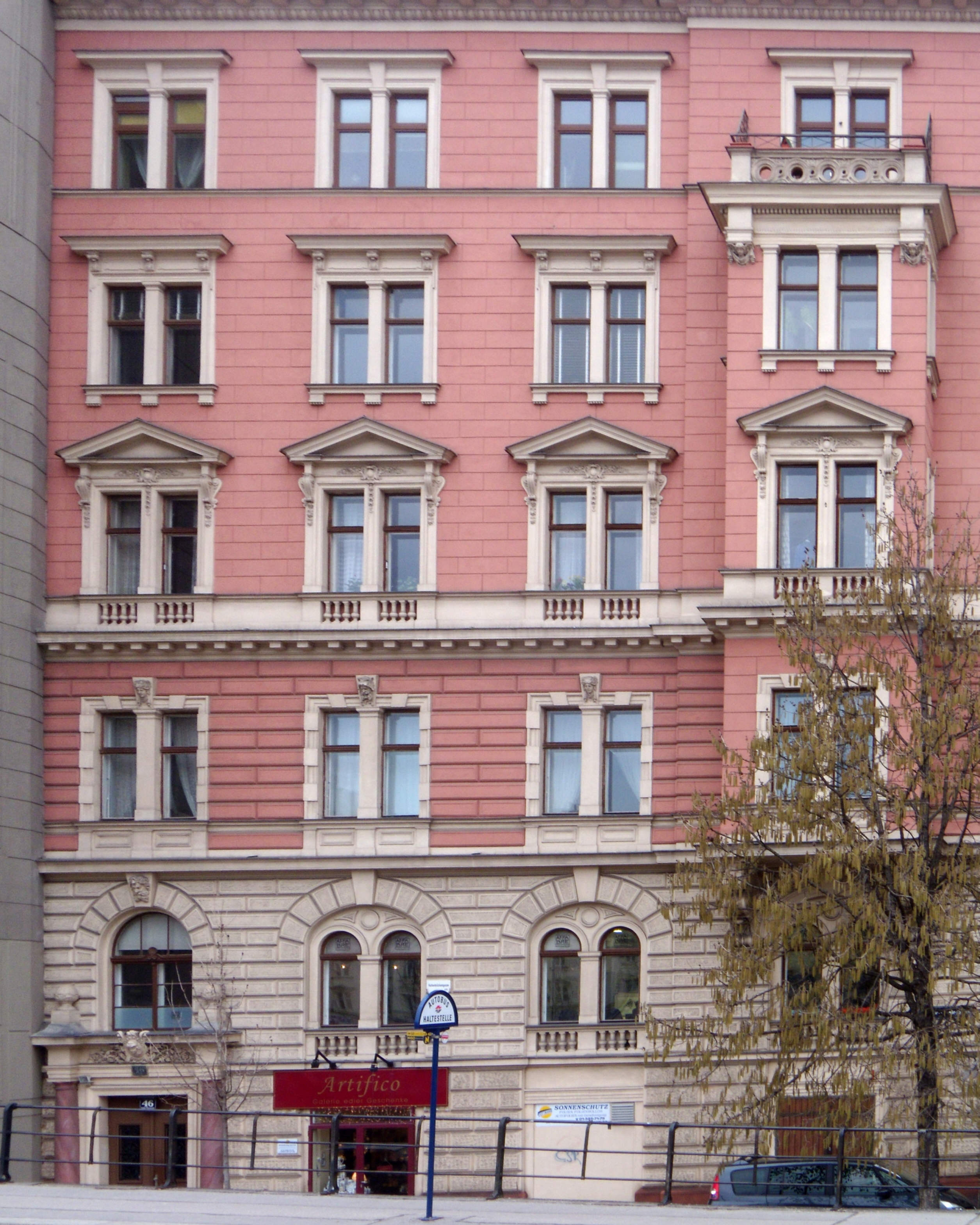 Wien-Mariahilf, Linke Wienzeile 46, Haus unter Straßenniveau, 1060 Wien, Österreich